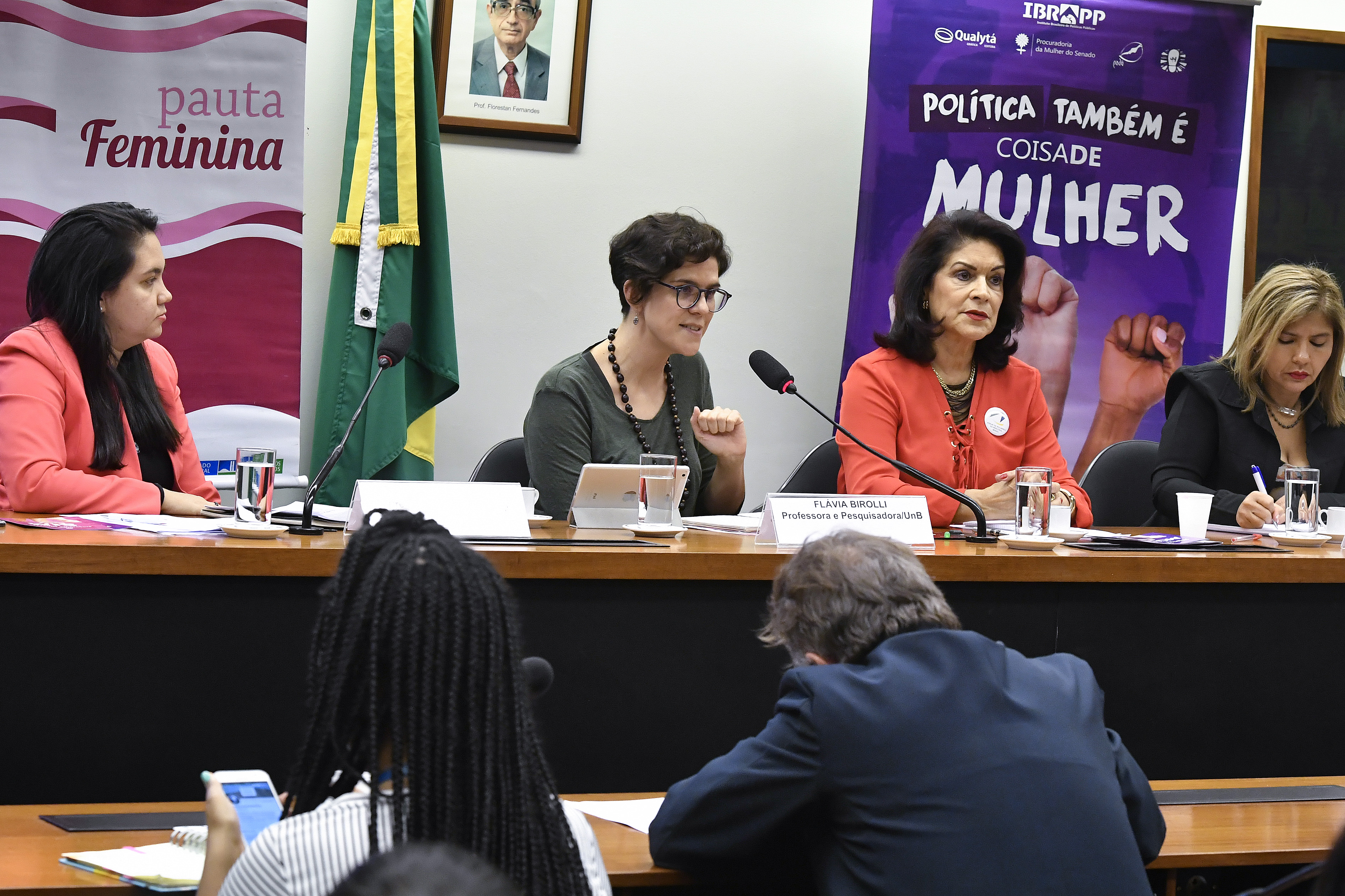 A Procuradoria Especial da Mulher do Senado (ProMul) e a Secretaria da Mulher da Câmara dos Deputados realizam programação intensiva durante a semana que comemora os 12 anos da Lei Maria da Penha, com premiação do concurso de Ilustrações Lei Maria da Penha; lançamento do 2º concurso de vídeos da Lei Maria da Penha; abertura das inscrições da Medalha Mietta Santiago; e realização de duas pautas Femininas, para discutir “A Violência Política contra a Mulher” e “Respostas para o Enfrentamento da Violência contra as Mulheres Negras”. Pauta Feminina: "A violência contra a mulher na política". Mesa: mestre em Ciência Política da Universidade de Brasília (UnB), Noëlle Silva; professora e pesquisadora da Universidade de Brasília (UnB), Flávia Biroli; presidente do Fórum de Mulheres do Mercosul, Emília Fernandes; presidente da União Brasileira de Mulheres (UBM), Vanja Andrea Reis dos Santos. Foto: Geraldo Magela/Agência Senado